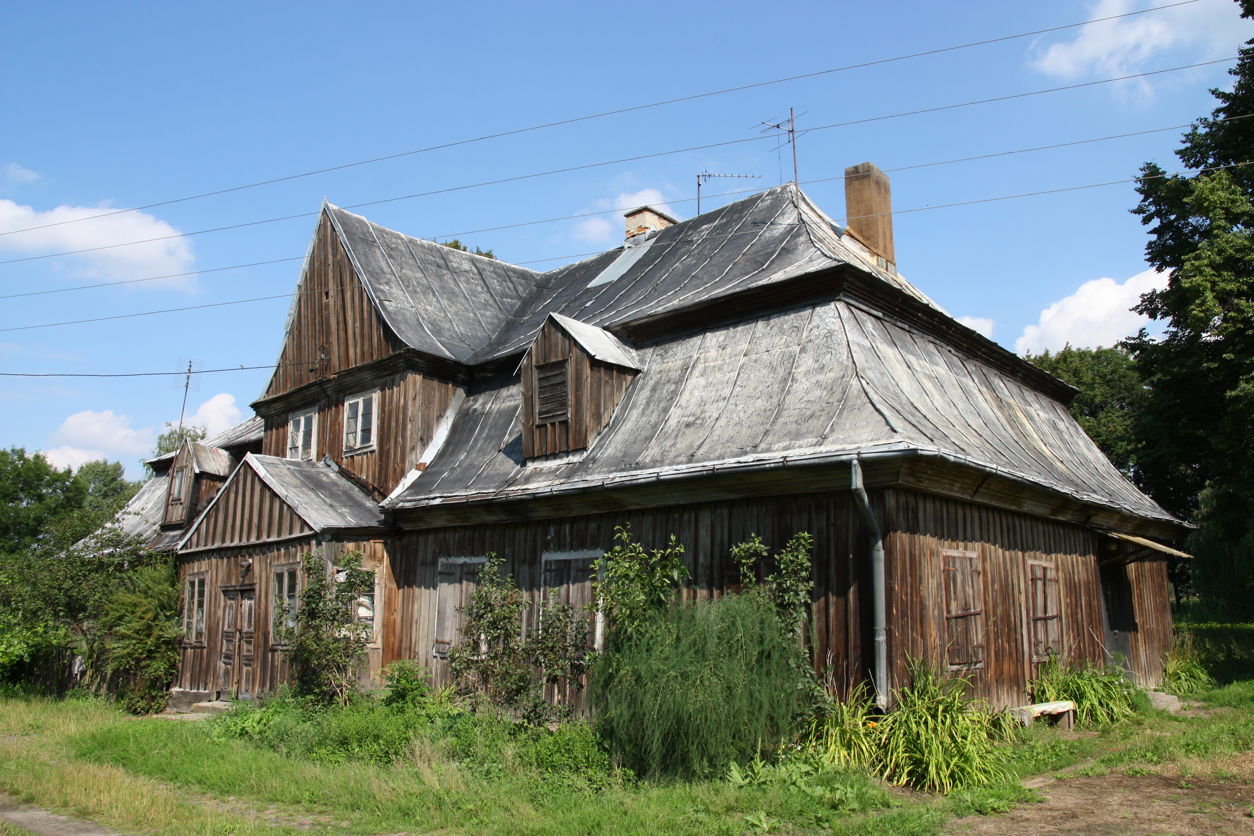 Barokowy dwór w Miłonicach. 11.1960.